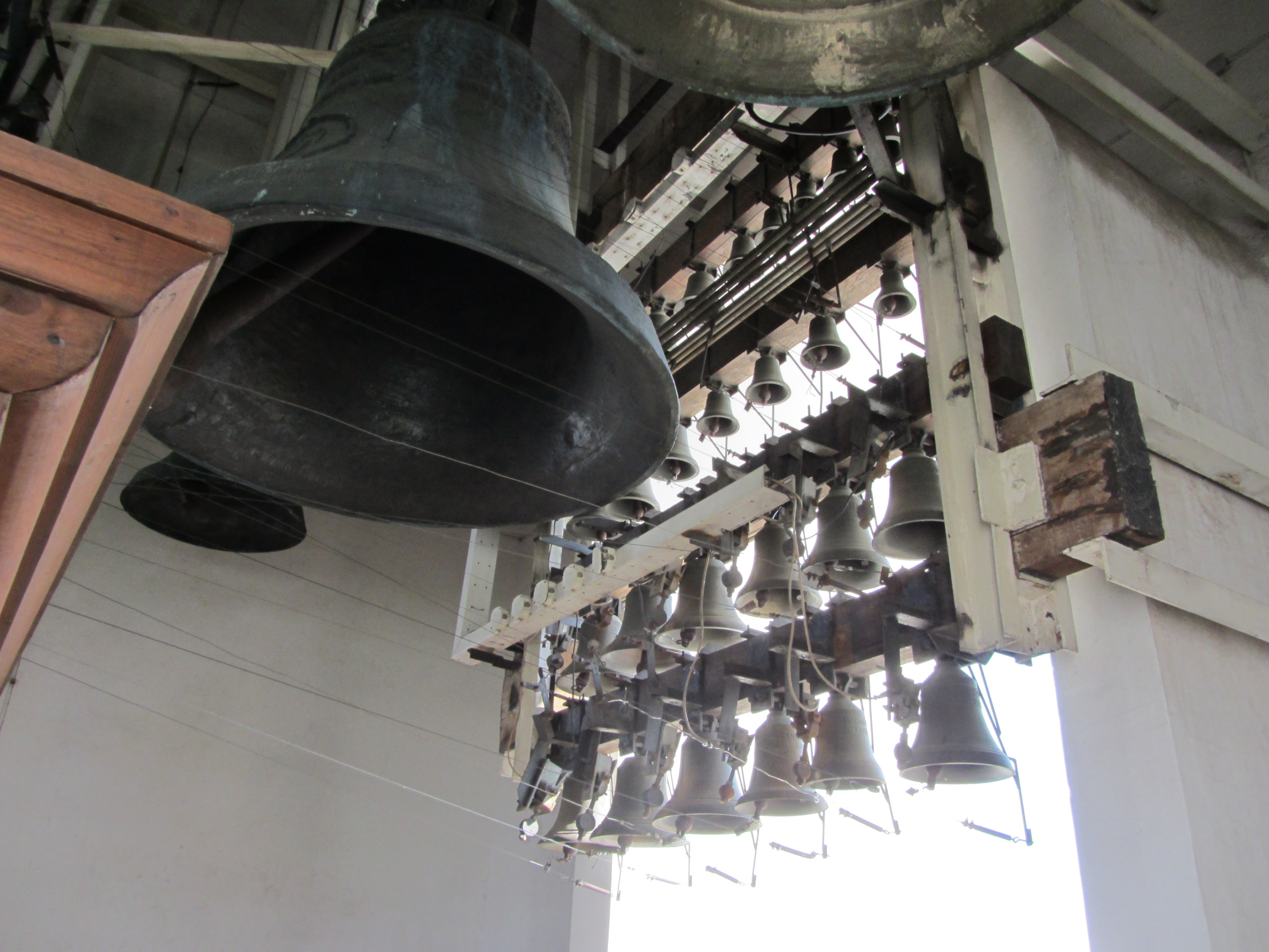 дзвони у Михайлівському золотоверхому монастирі